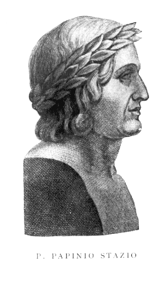 Publio Papinio Stazio